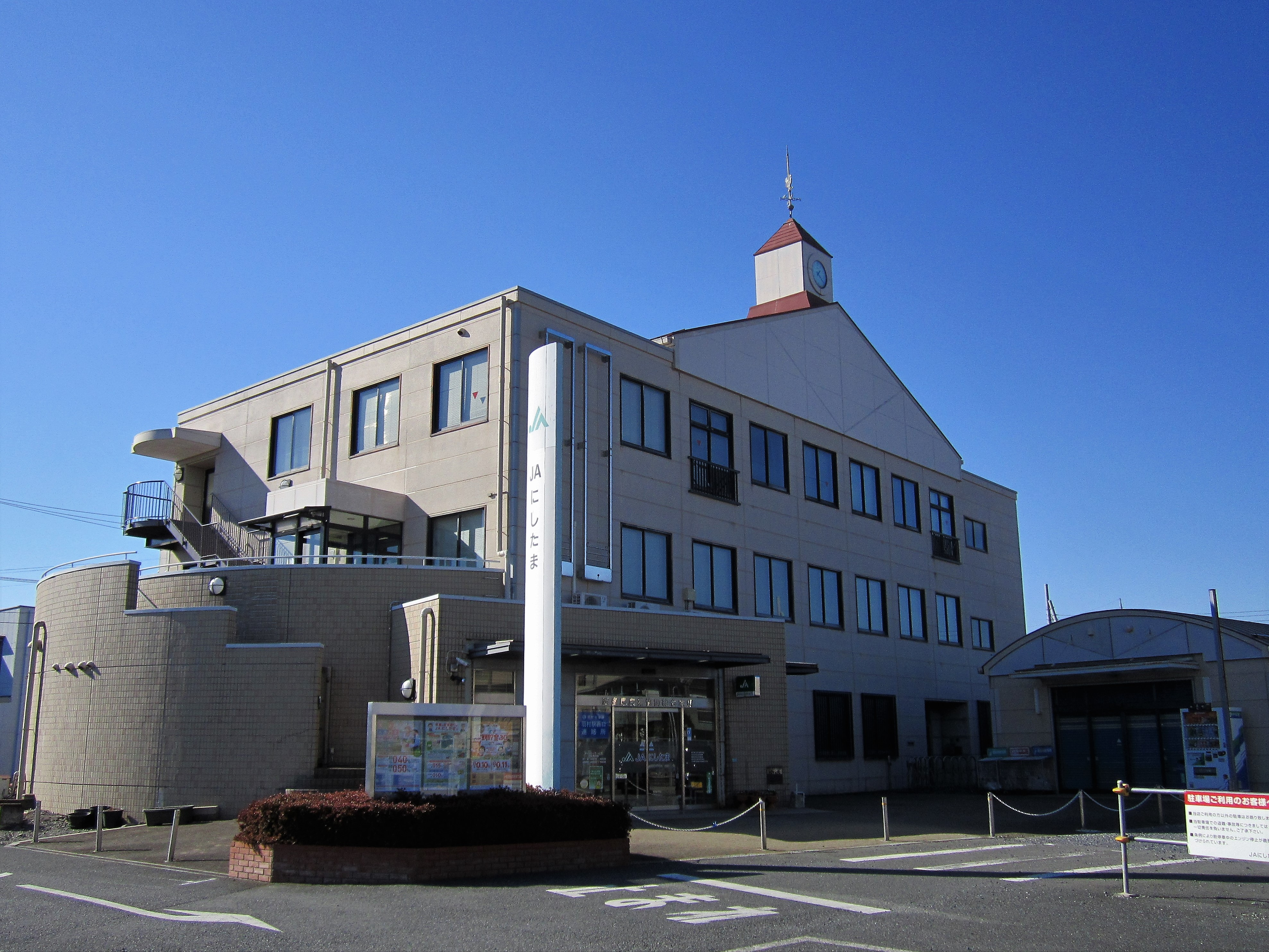 西多摩農業協同組合 本店（羽村市羽東） Canon PowerShot A2200